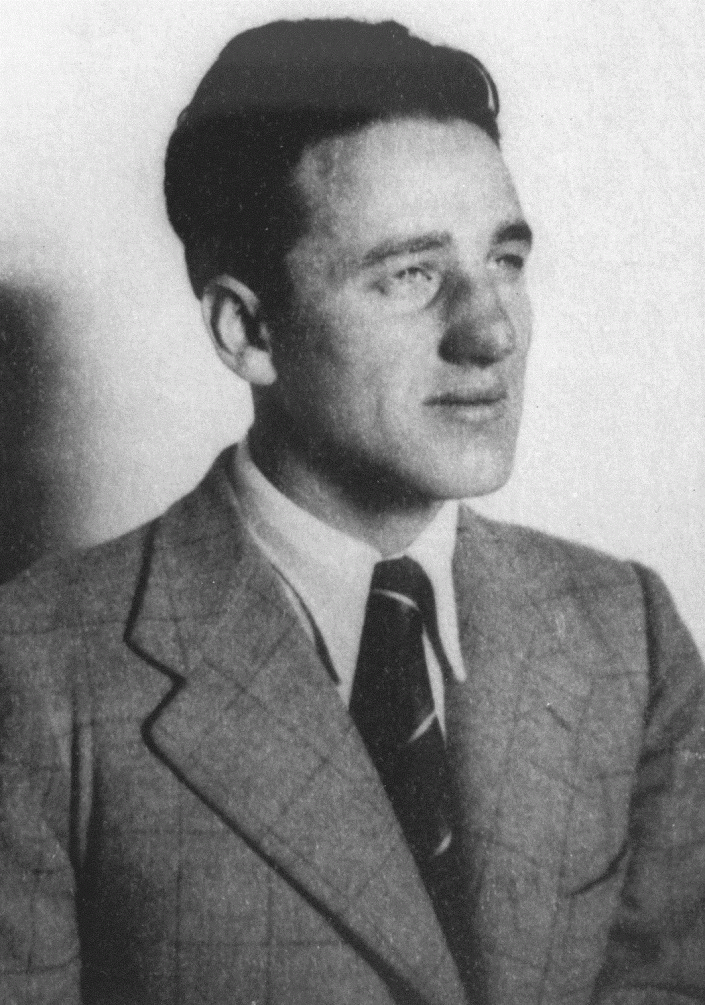 Alfréd Bartoš (* 23. září 1916, Vídeň – 22. června 1942, Pardubice) byl československý voják, příslušník československého protinacistického odboje za 2. světové války. V letech 1941 až 1942 byl velitel výsadkové skupiny Silver A, která mimo jiné spolupracovala se skupinou Anthropoid při atentátu na zastupujícího říšského protektora R. Heydricha. Objevení vysílačky této skupiny mělo za následek vyhlazení obce Ležáky.